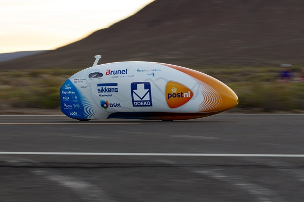 De derde fiets van het Human Power Team Delft & Amsterdam, de VeloX 3.